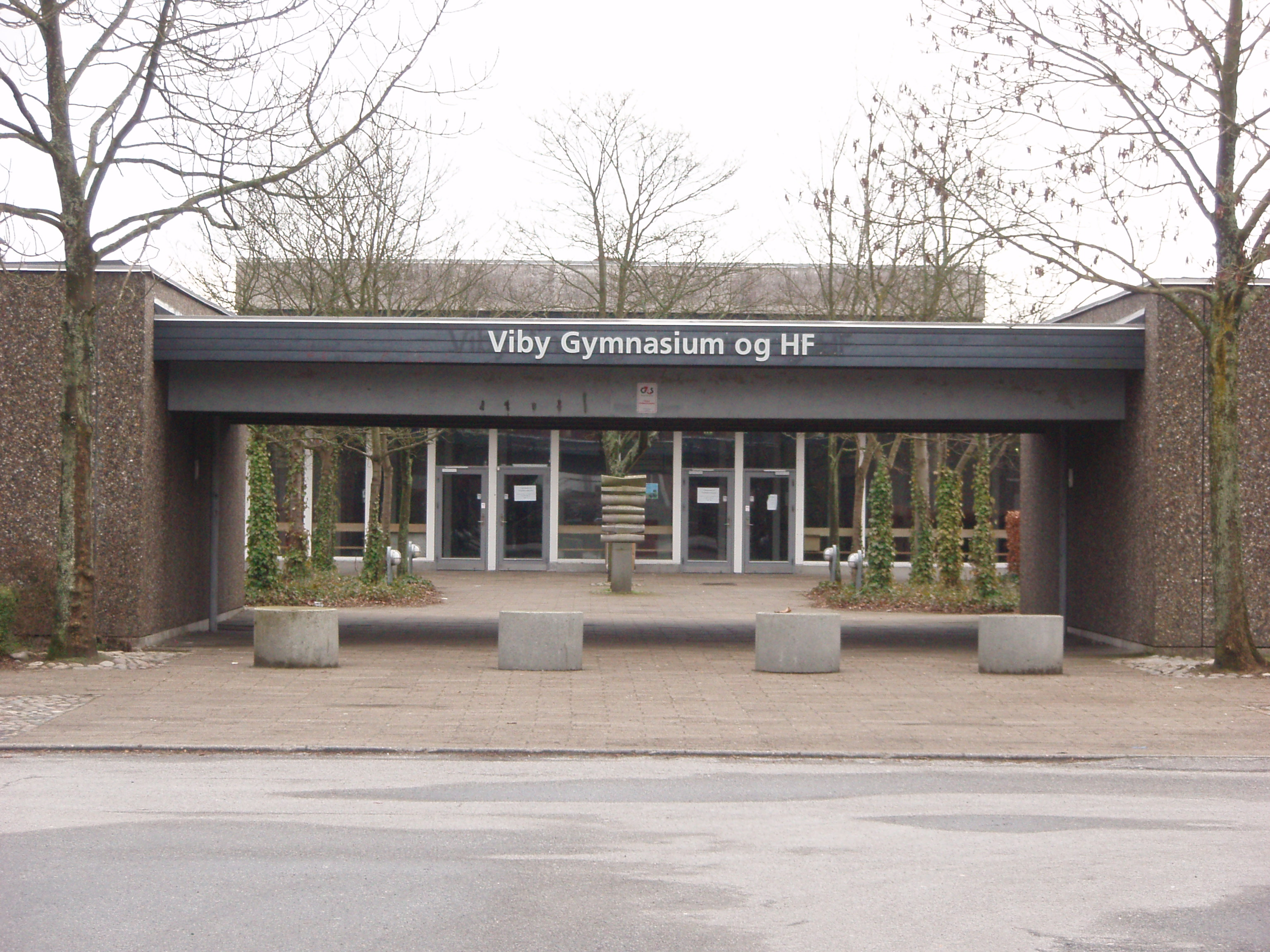 Indgangspartiet af Viby Gymnasium og HF